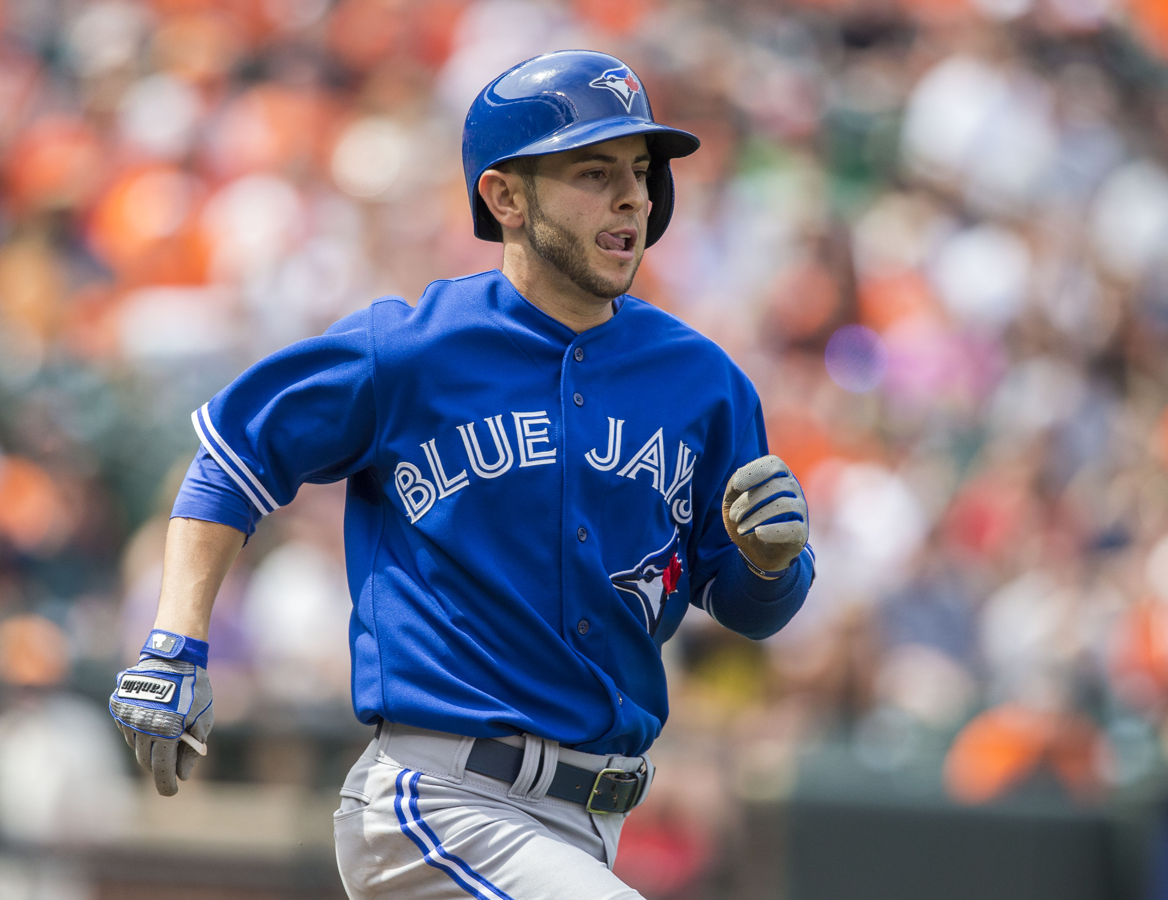 Blue Jays at Orioles 4/13/14